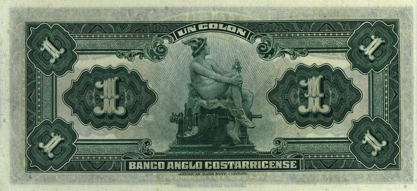 1 колон (1917). Коста-Рика. Реверс. Меркурий (мифология).